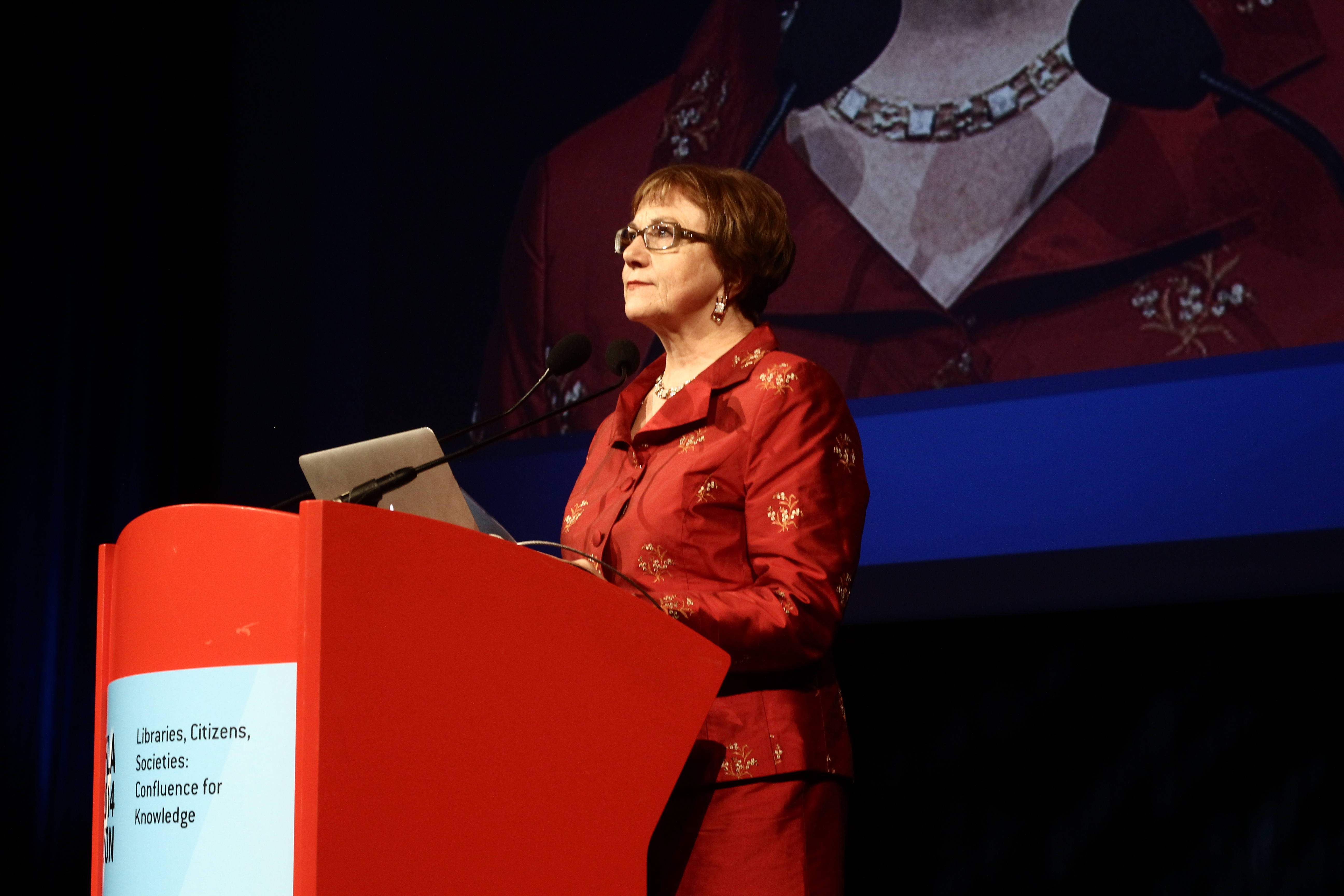 Sinikka Sipilä, présidente de l'IFLA - IFLA WLIC 2014